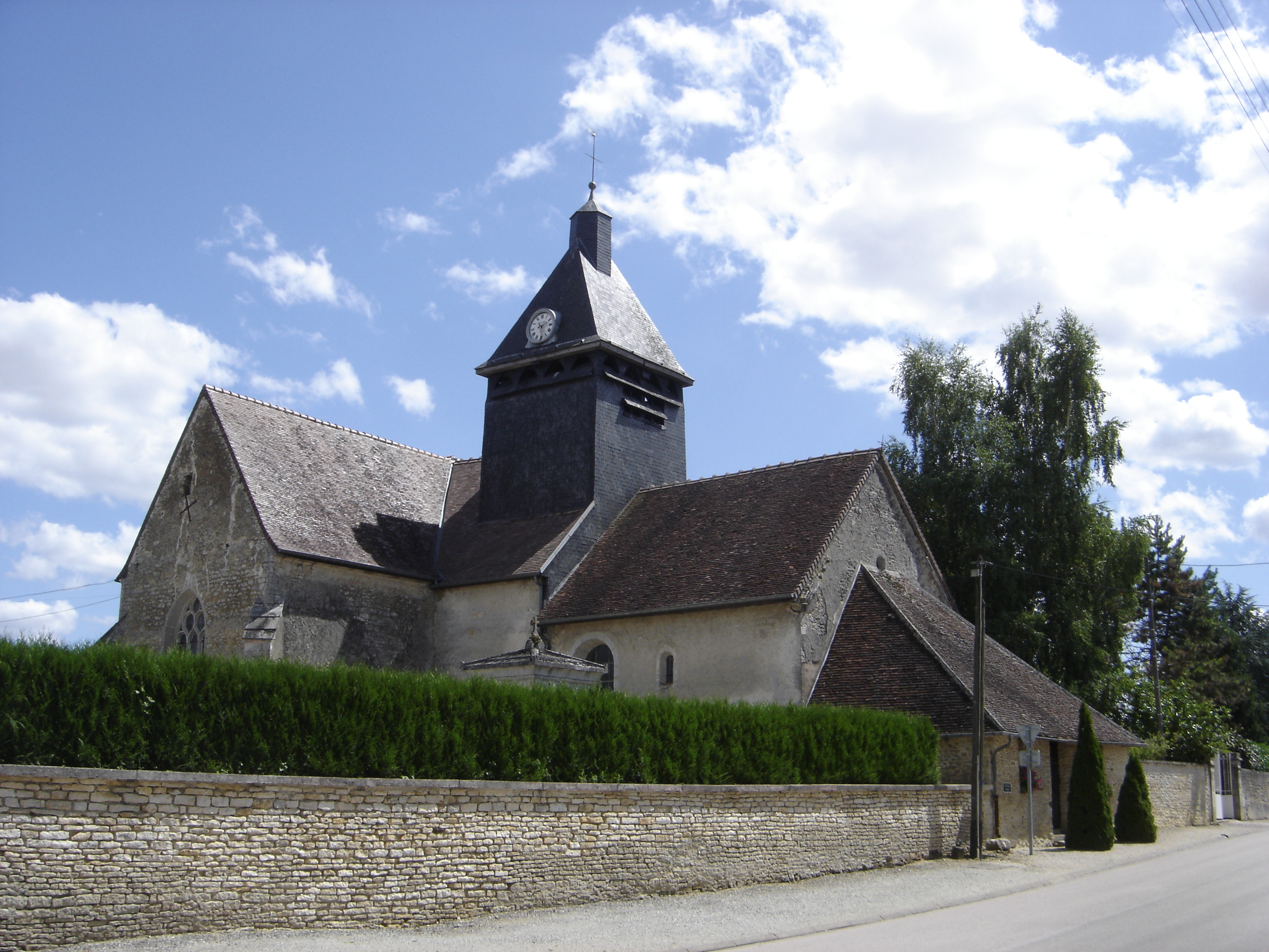 Eglise de Magny-Fouchard - Aube - France